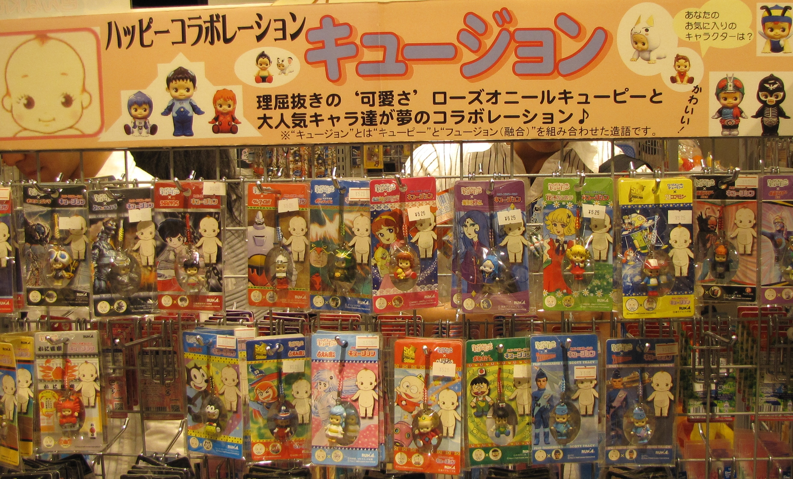 キュージョン商品販売コーナー。